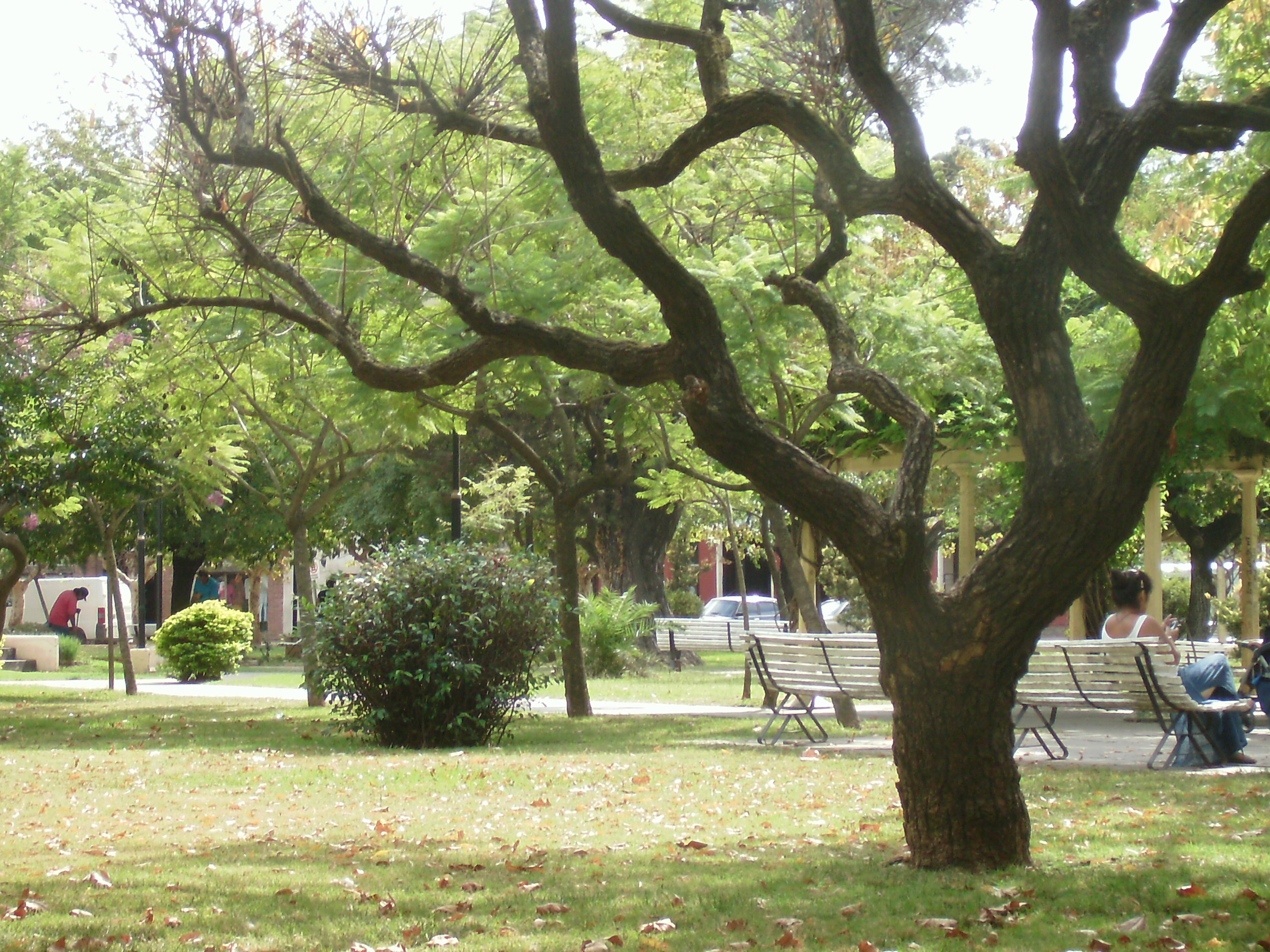 Plaze principal de la ciudad de Garin.